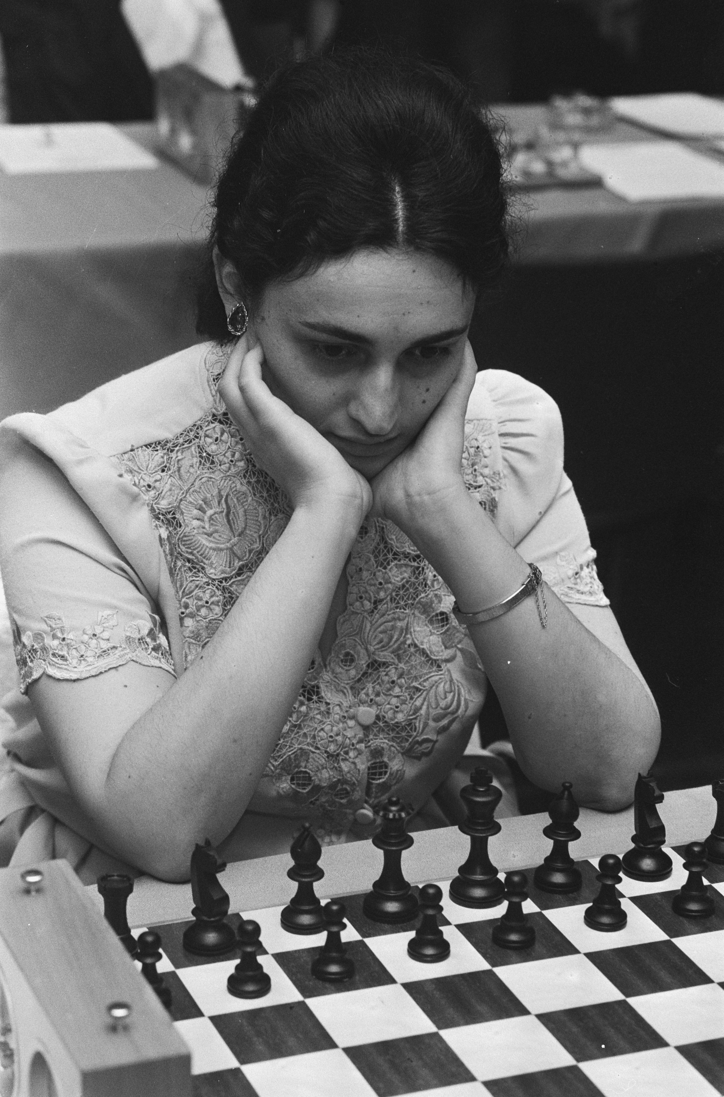 Collectie / Archief : Fotocollectie Anefo Reportage / Serie : [ onbekend ] Beschrijving : Ohra schaaktoernooi Maja Chiburdanidze tijdens haar partij met Pieterse Datum : 22 juli 1986 Trefwoorden : Schaken, toernooien Instellingsnaam : OHRA Fotograaf : Molendijk, Bart / Anefo Auteursrechthebbende : Nationaal Archief Materiaalsoort : Negatief (zwart/wit) Nummer archiefinventaris : bekijk toegang 2.24.01.05 Bestanddeelnummer : 933-7153